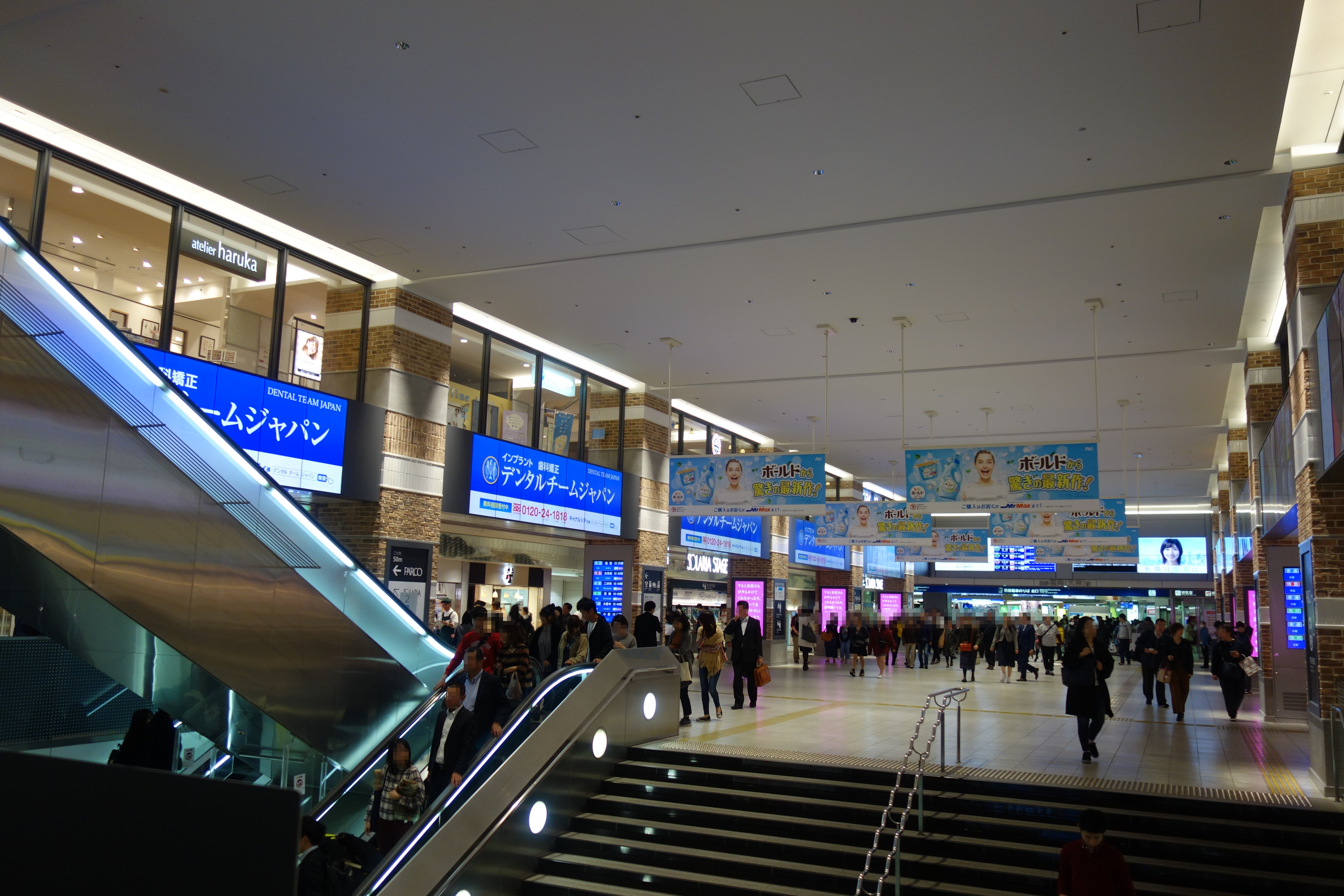 西鉄福岡(天神)駅・北口改札外コンコース